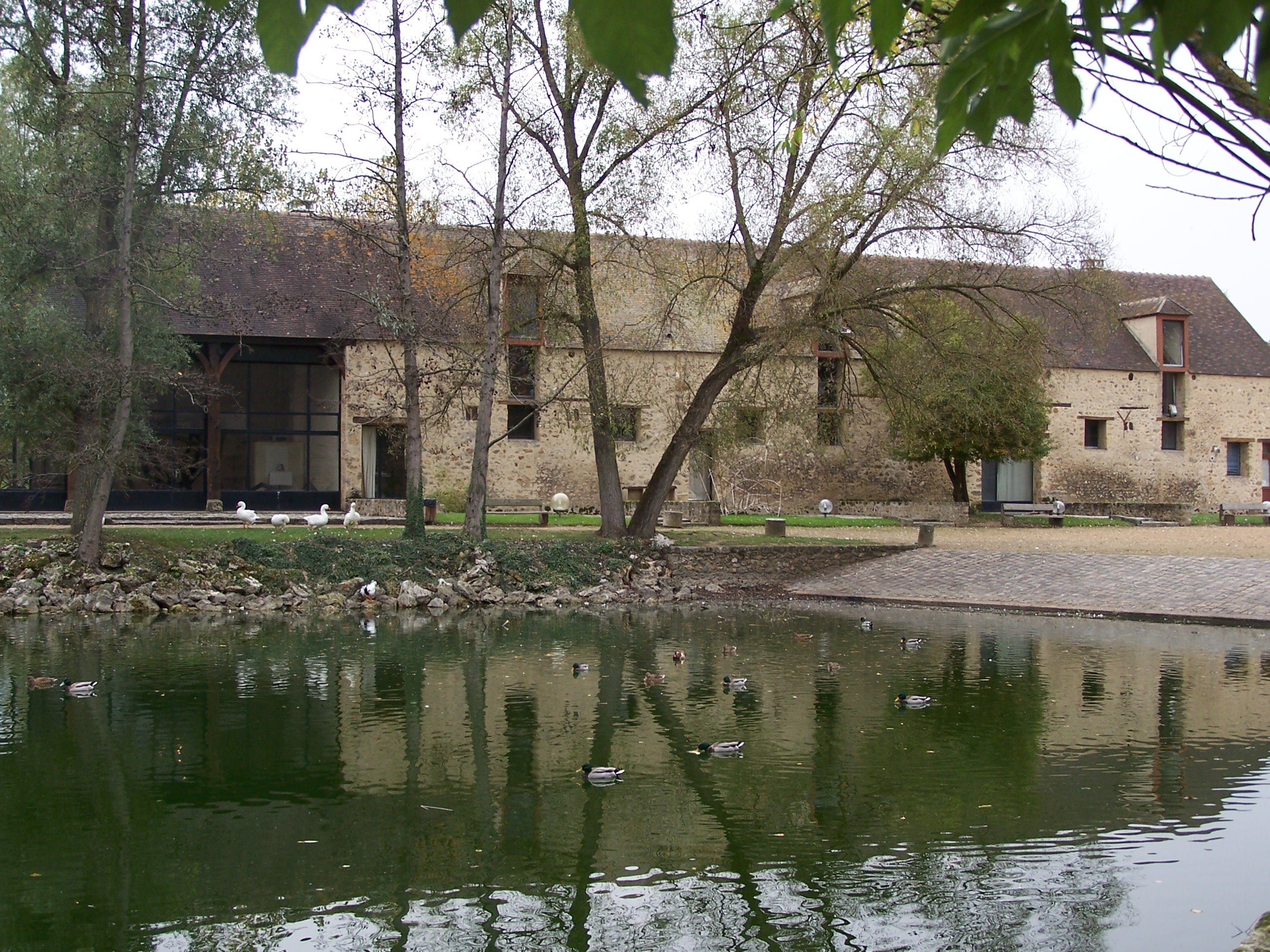 Abreuvoir à la Commanderie des Templiers de la Villedieu-Maurepas, fondée vers 1180, à Élancourt, Yvelines, France.